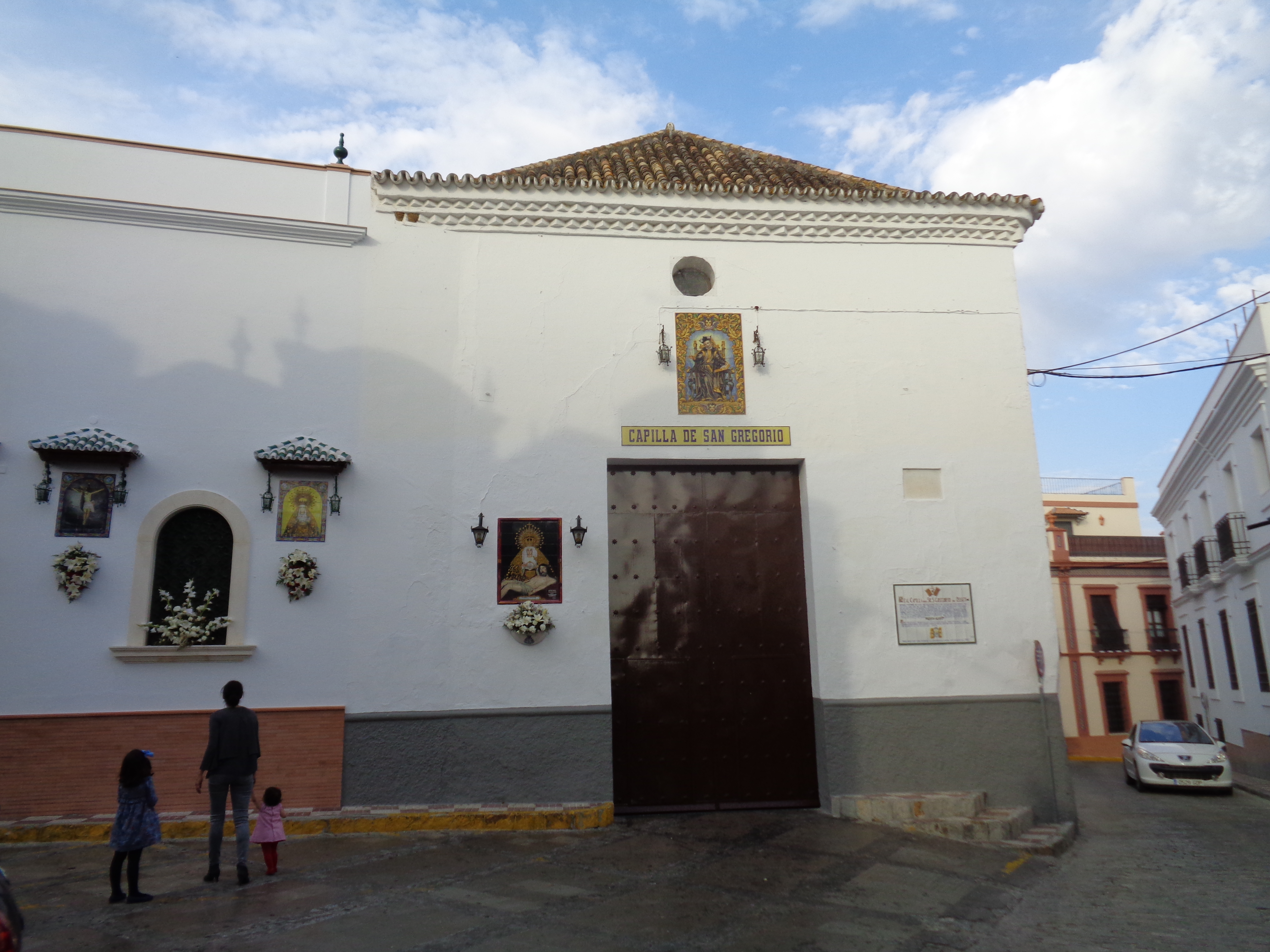 Capila de San Gregorio de Osset en Alcalá del Río, en la provincia de Sevilla